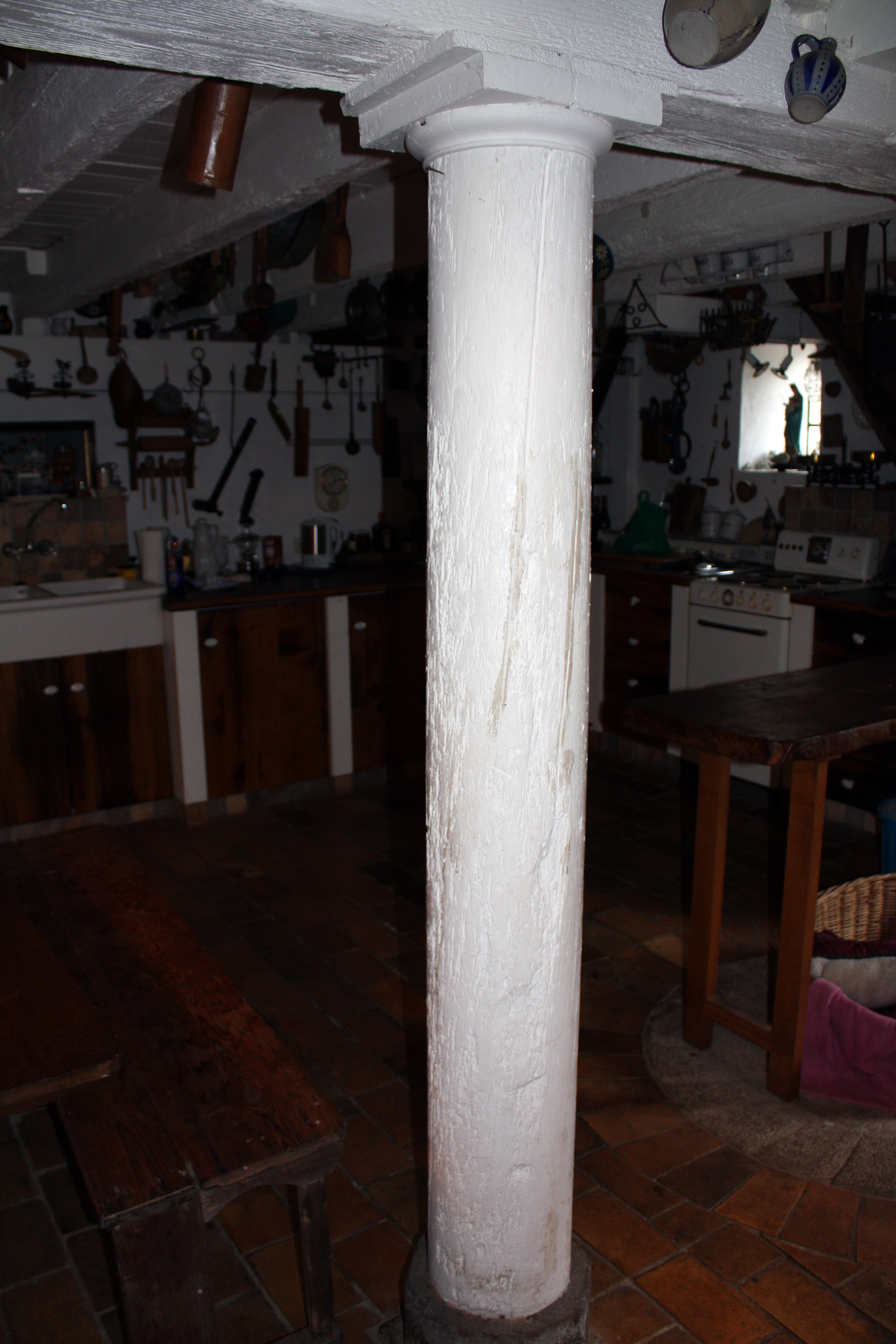 Lechenich Oebelsmühle. Eine der tragenden Säulen des Untergeschosses. Wahrscheinlich 18. Jh.